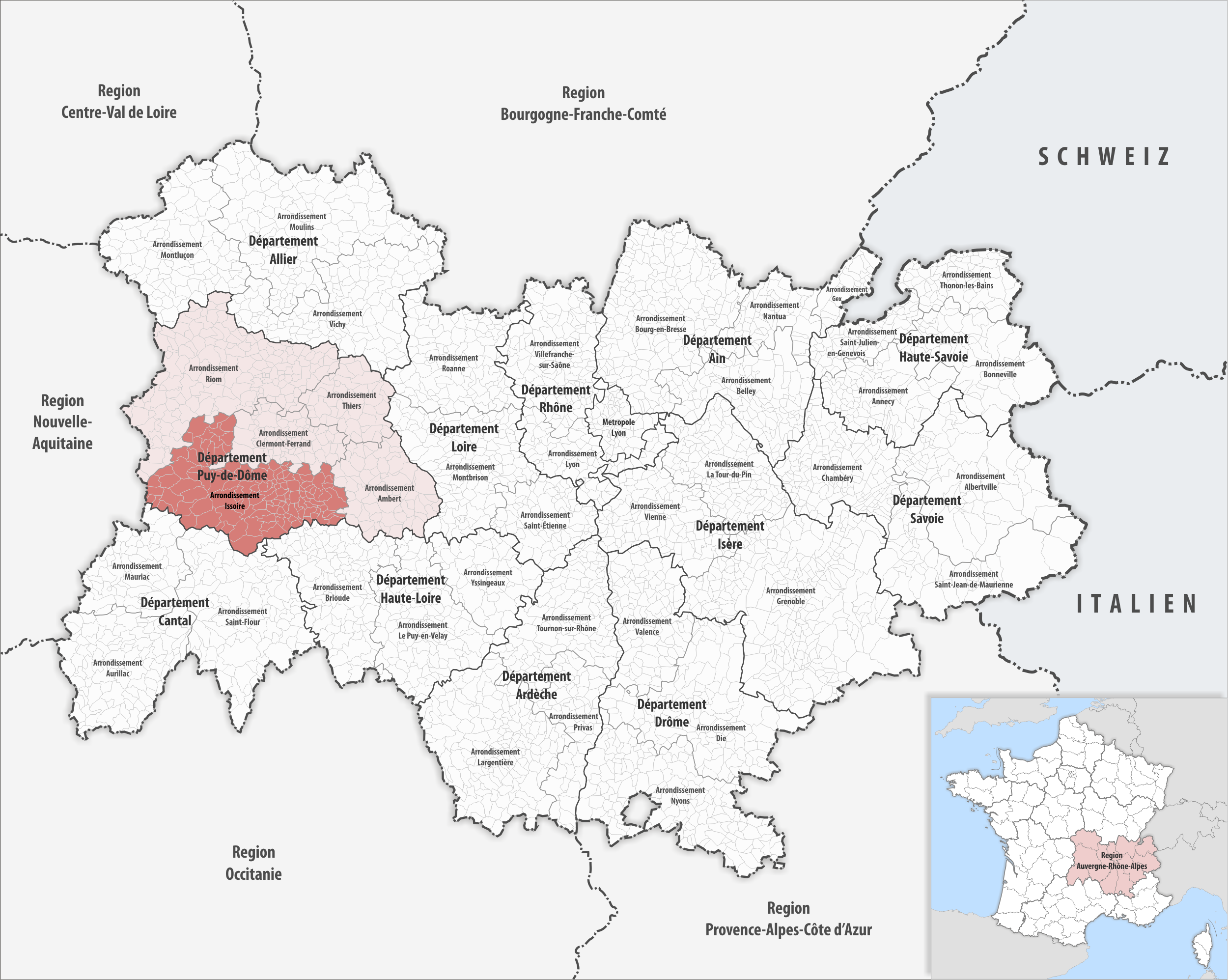 Lage des Arrondissements Issoire